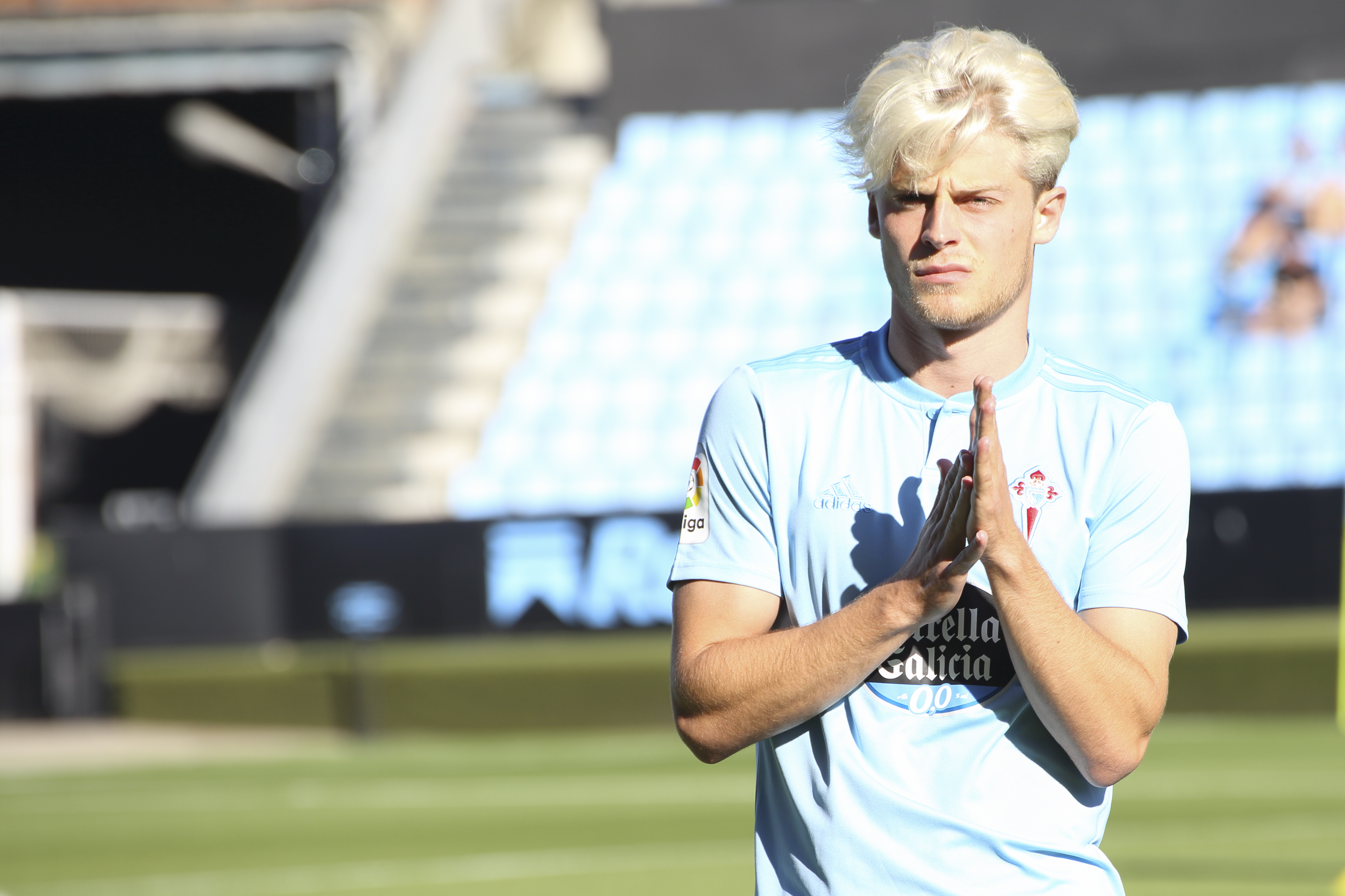 Presentación RC Celta - Temporada 18/19